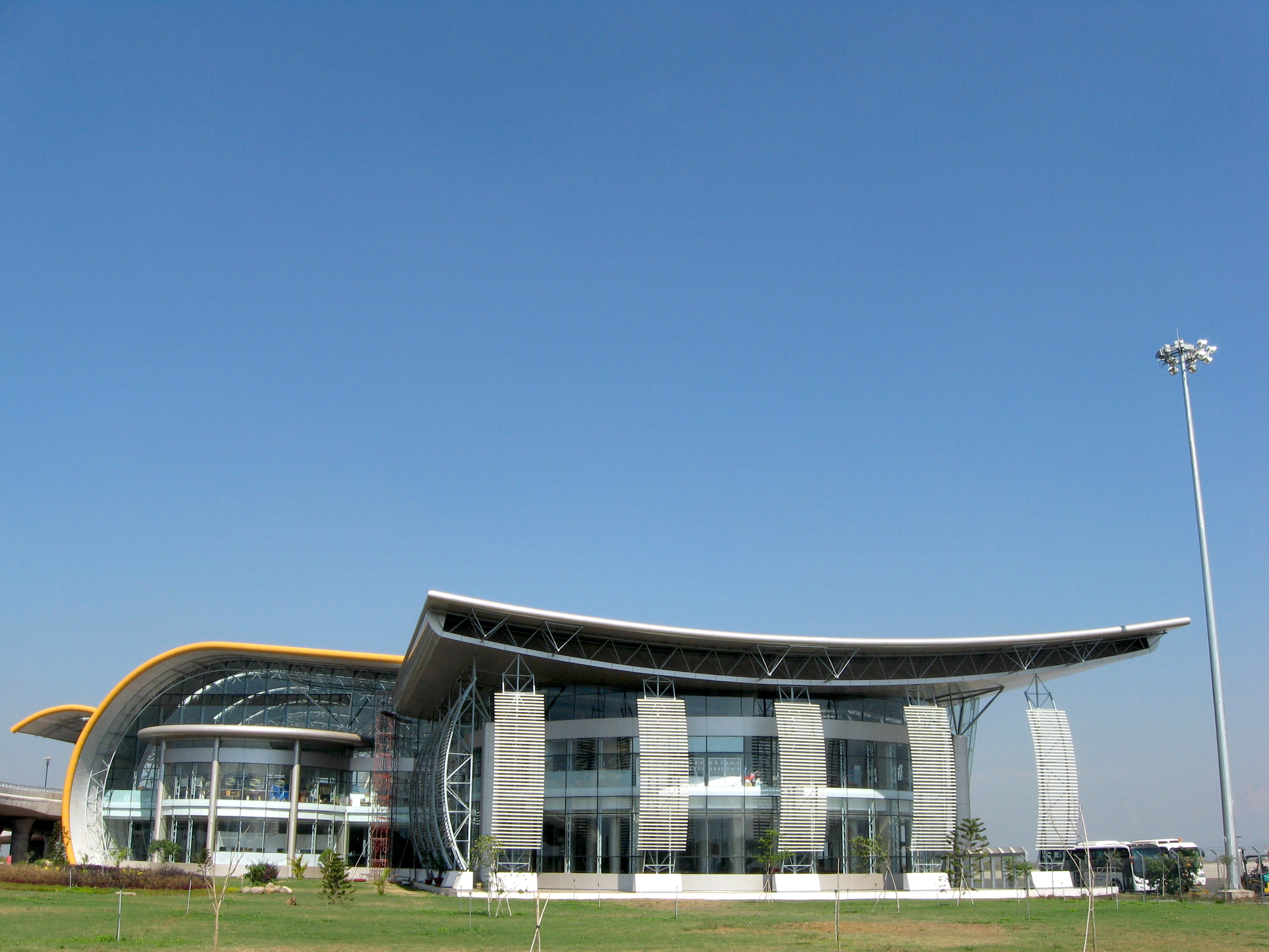 Lien Khuong Airport